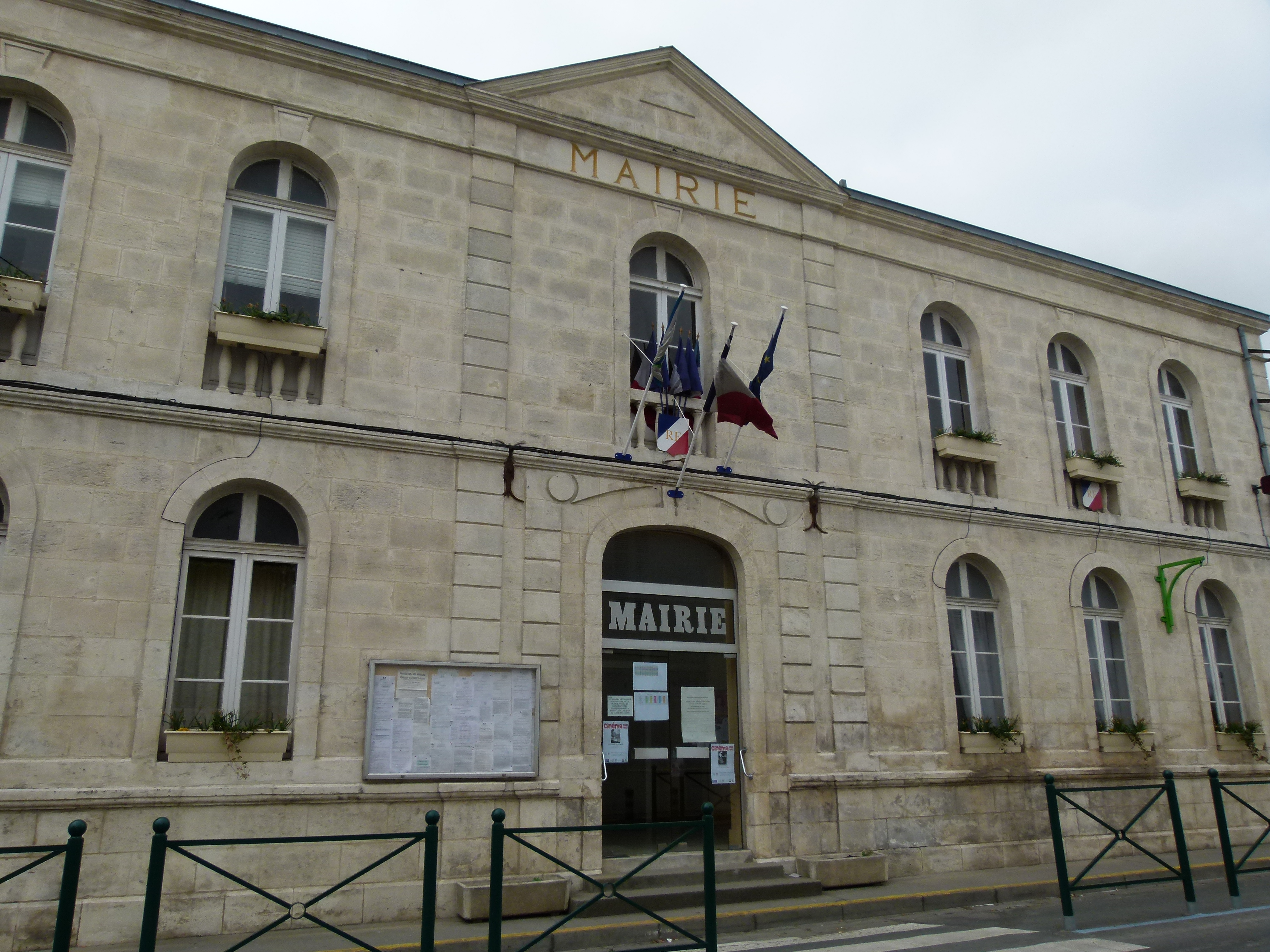 Façade nord de la mairie d'Aigrefeuille-d'Aunis.